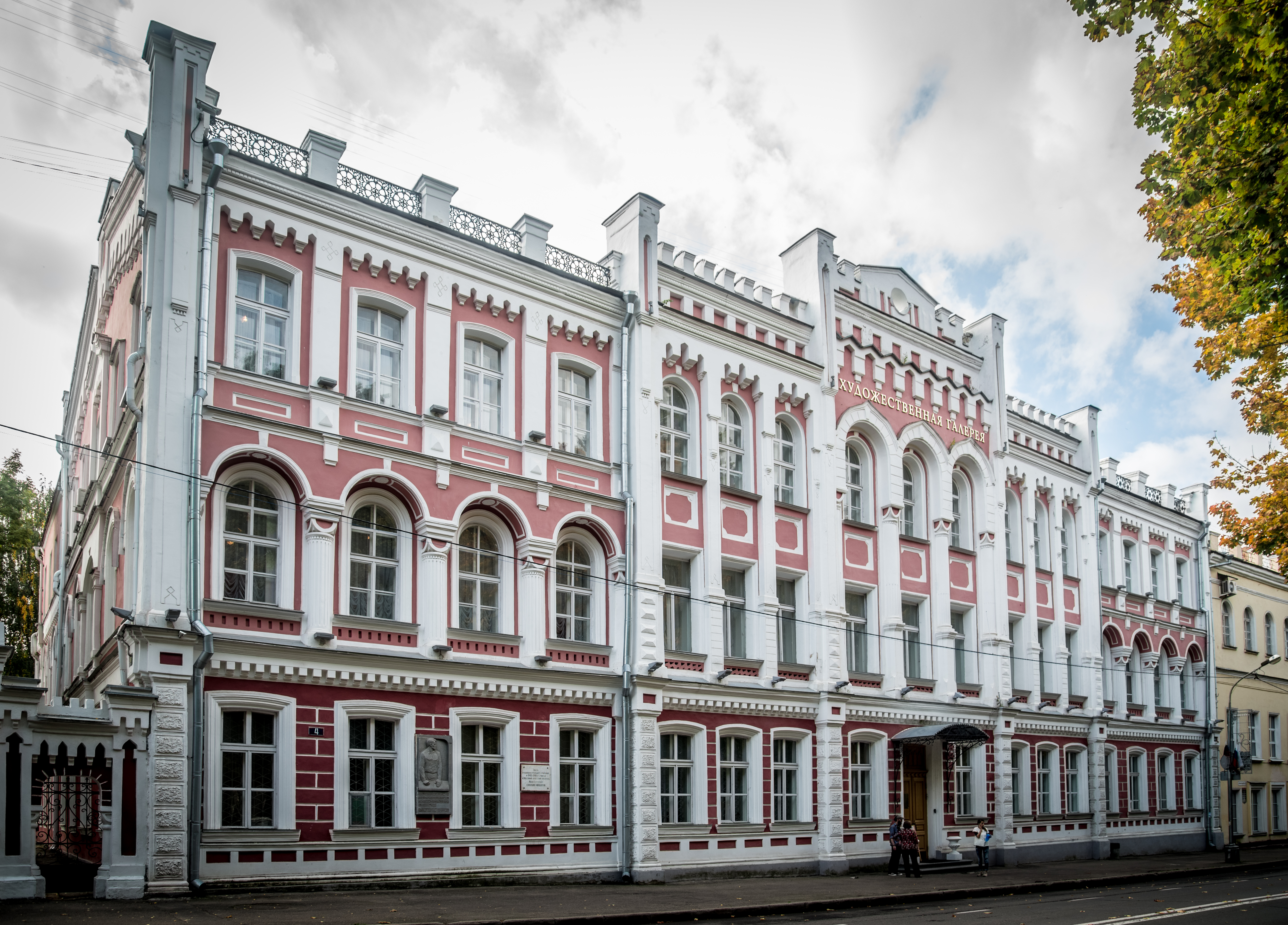 Здание реального училища: улица Коммунистическая, 4, Смоленск, Смоленский район, Смоленская область